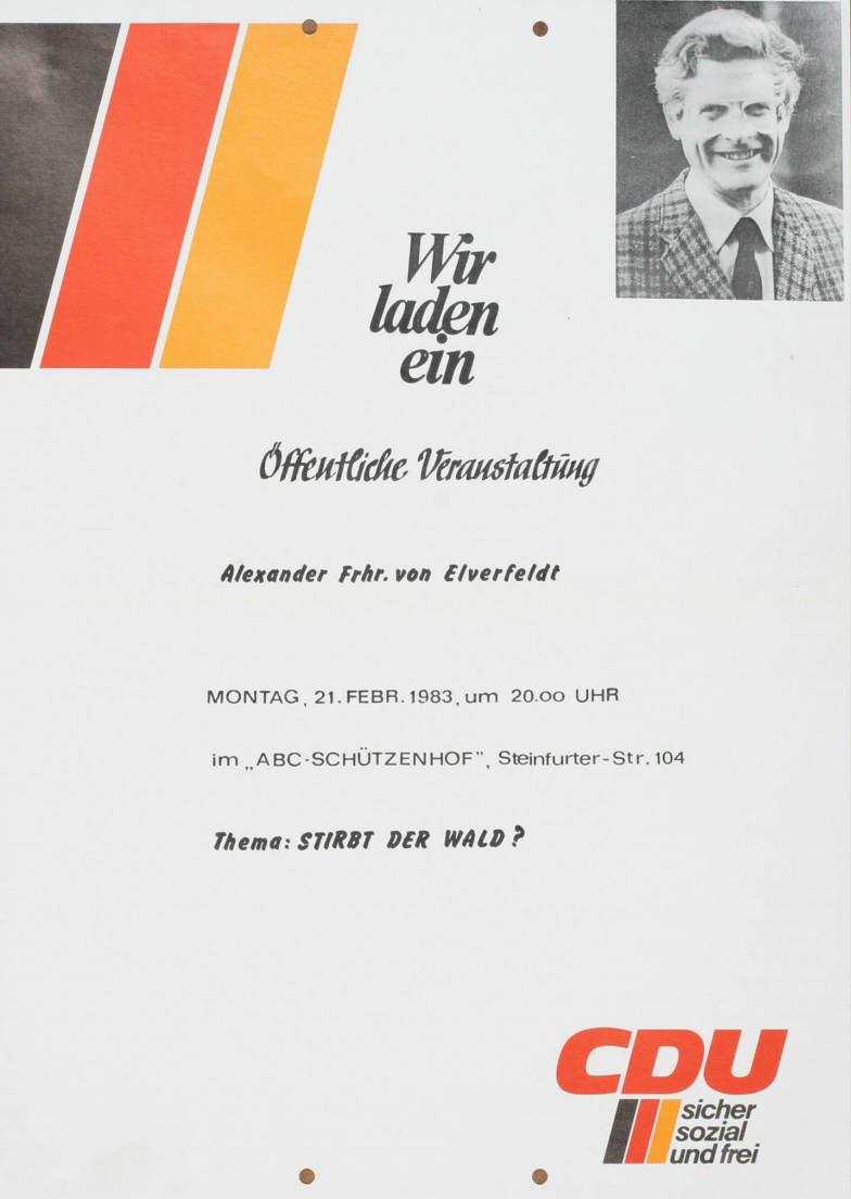 Wir laden ein Öffentliche Veranstaltung Alexander Frhr. von Elverfeldt ... Thema: Stirbt der Wald? CDU sicher sozial und freiAbbildung:Porträtfoto - NationalfarbenPlakatart:AnkündigungsplakatObjekt-Signatur:10-001: 2636Bestand:Plakate zu Bundestagswahlen (10-001)GliederungBestand10-18:Plakate zu Bundestagswahlen (10-001) » Die 10. Bundestagswahl am 6. März 1983 » CDU » AnkündigungsplakateLizenz:KAS/ACDP 10-001: 2636 CC-BY-SA 3.0 DE